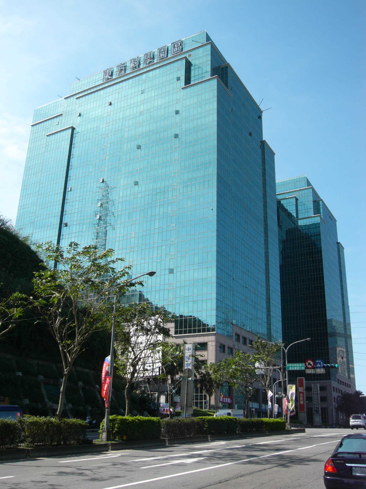 東方科學園區左前方外觀。